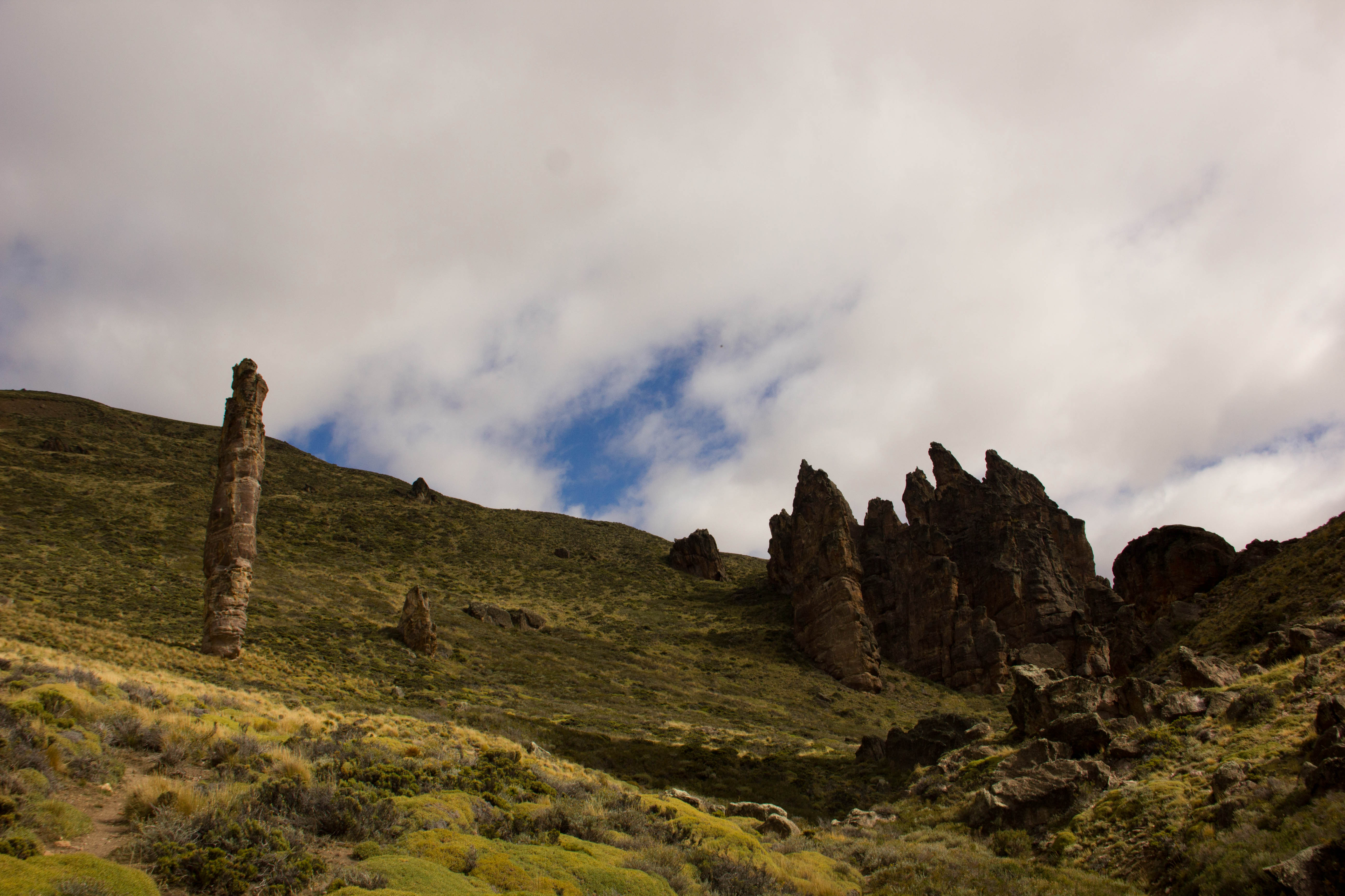 Casi nos morimos! XI Region